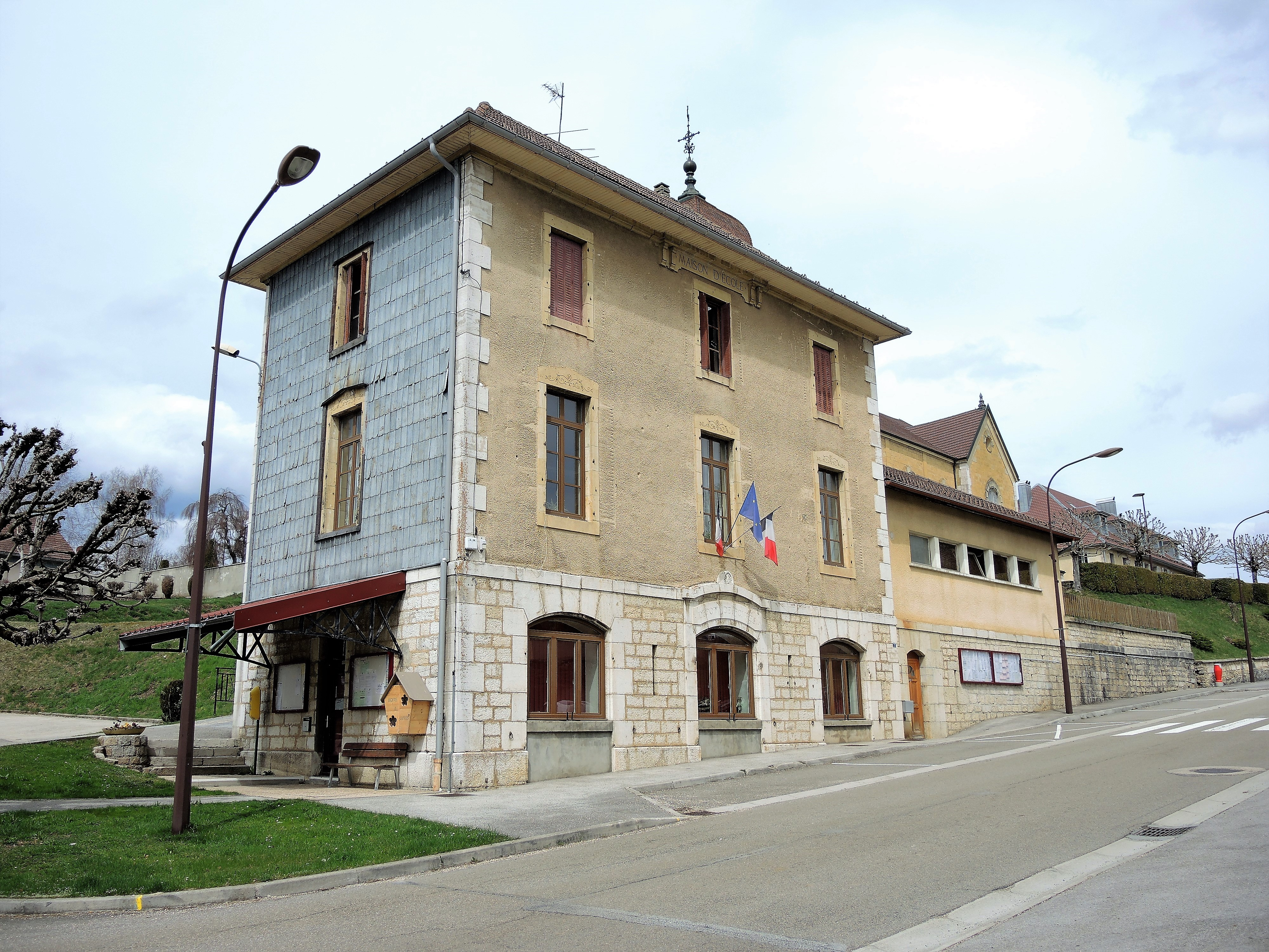 Mairie de Labergement-Sainte-Marie. Doubs